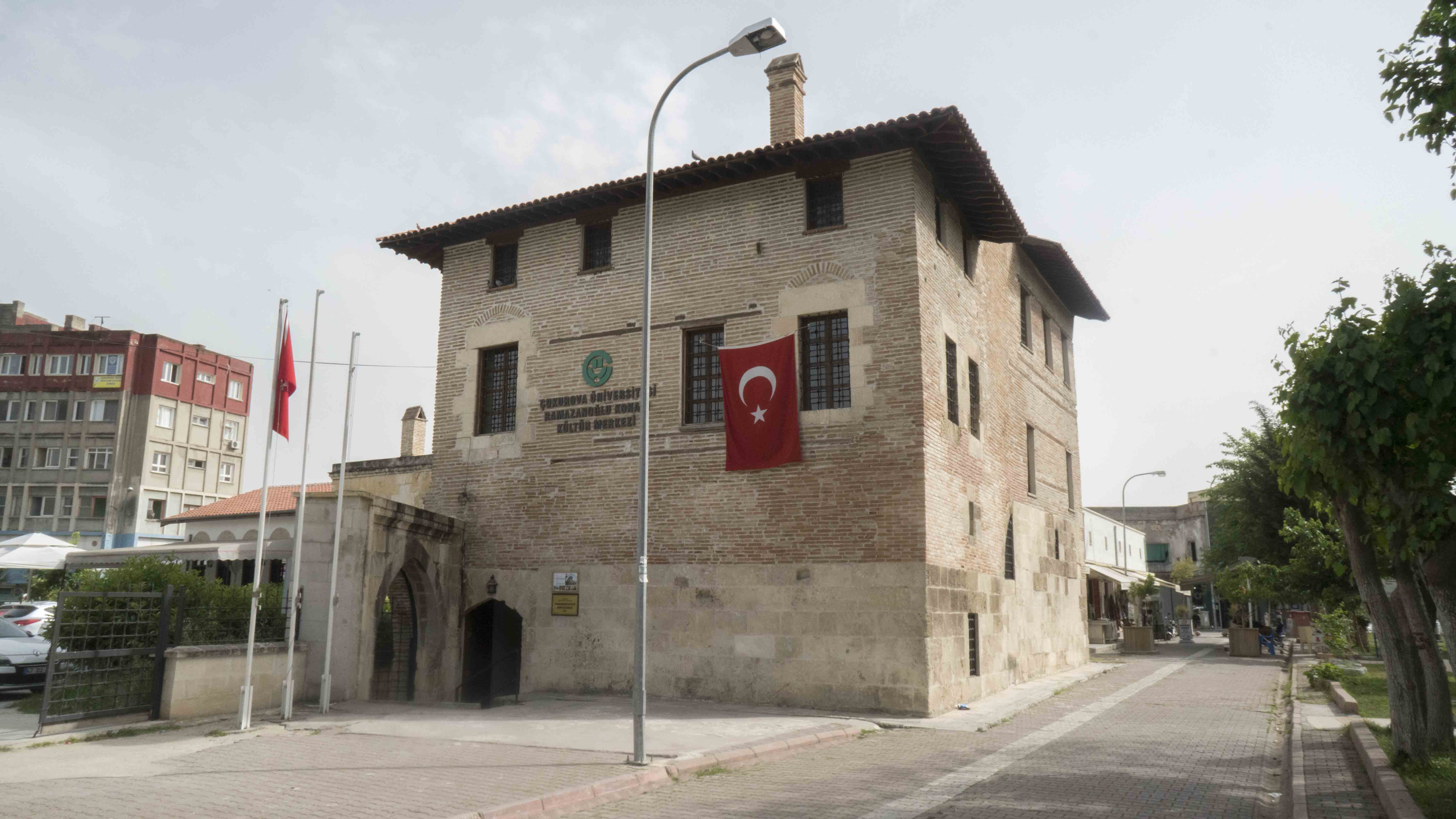 Ramazanoğlu Hall near Ulucami mosque in Adana Object location36° 59′ 04.39″ N, 35° 19′ 52.27″ E